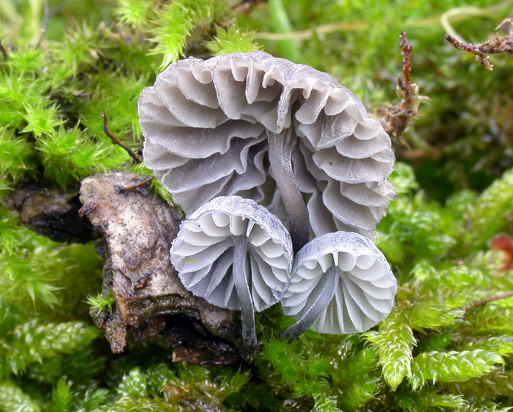 Mycena pseudocorticola